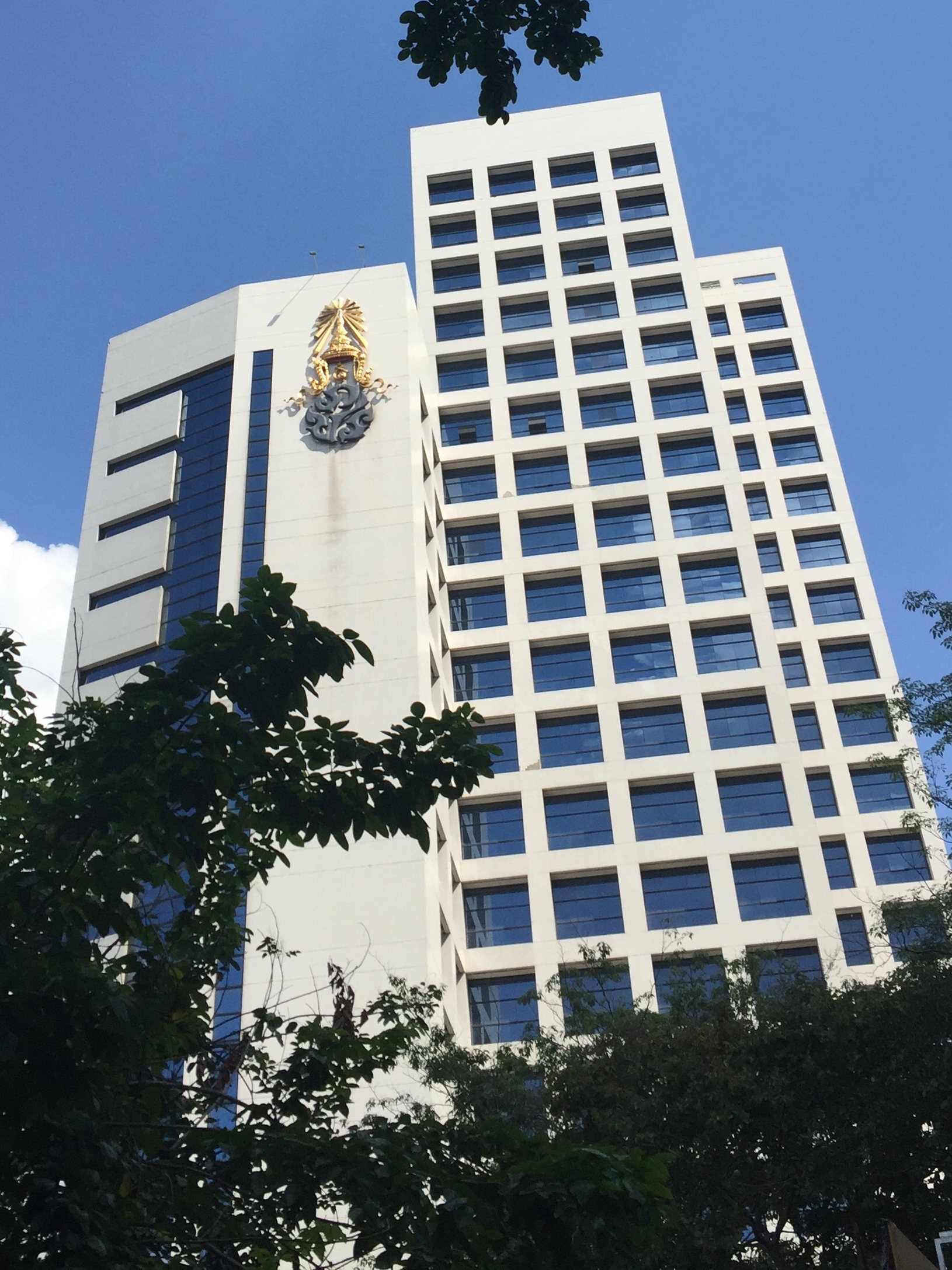 อาคาร ภปร.